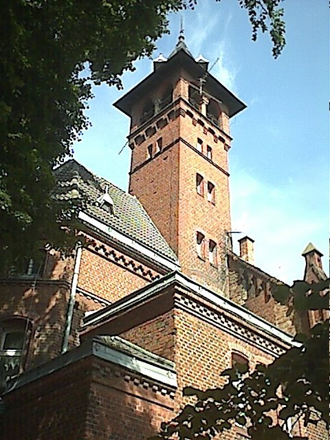 Pałac w Bobrowie. Zdjęcie wykonał Zygmunt Cichecki